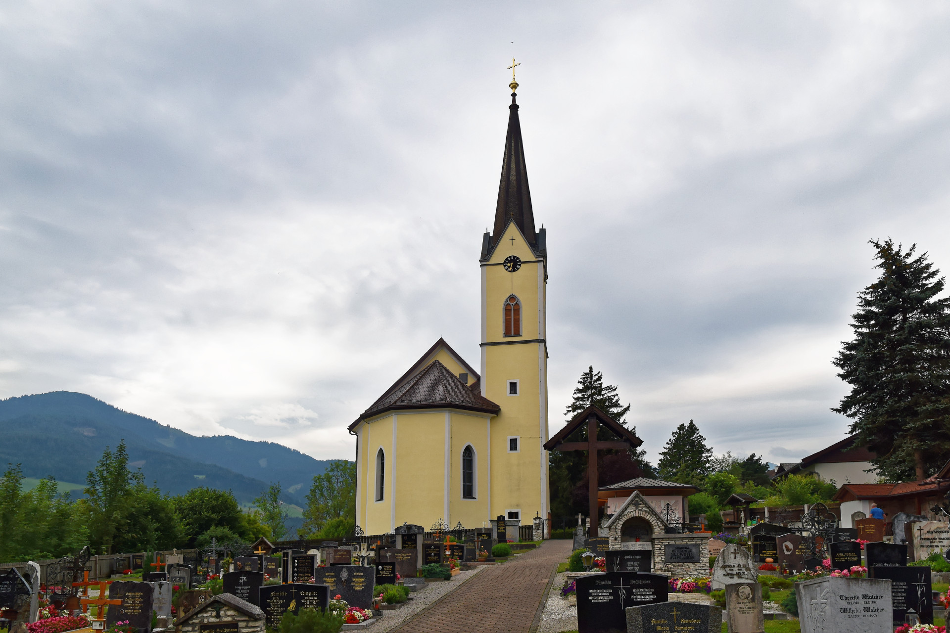 Evang. Pfarrkirche A.B., Heilandskirche